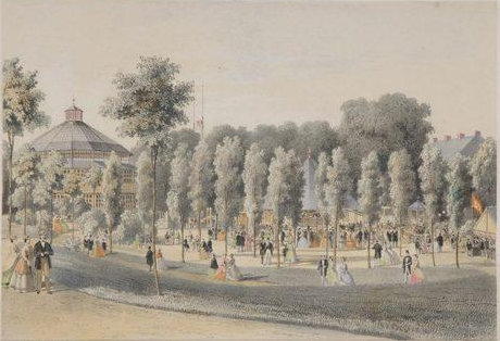 Schmidts Tivoli Hamburg Altona am Schulterblatt